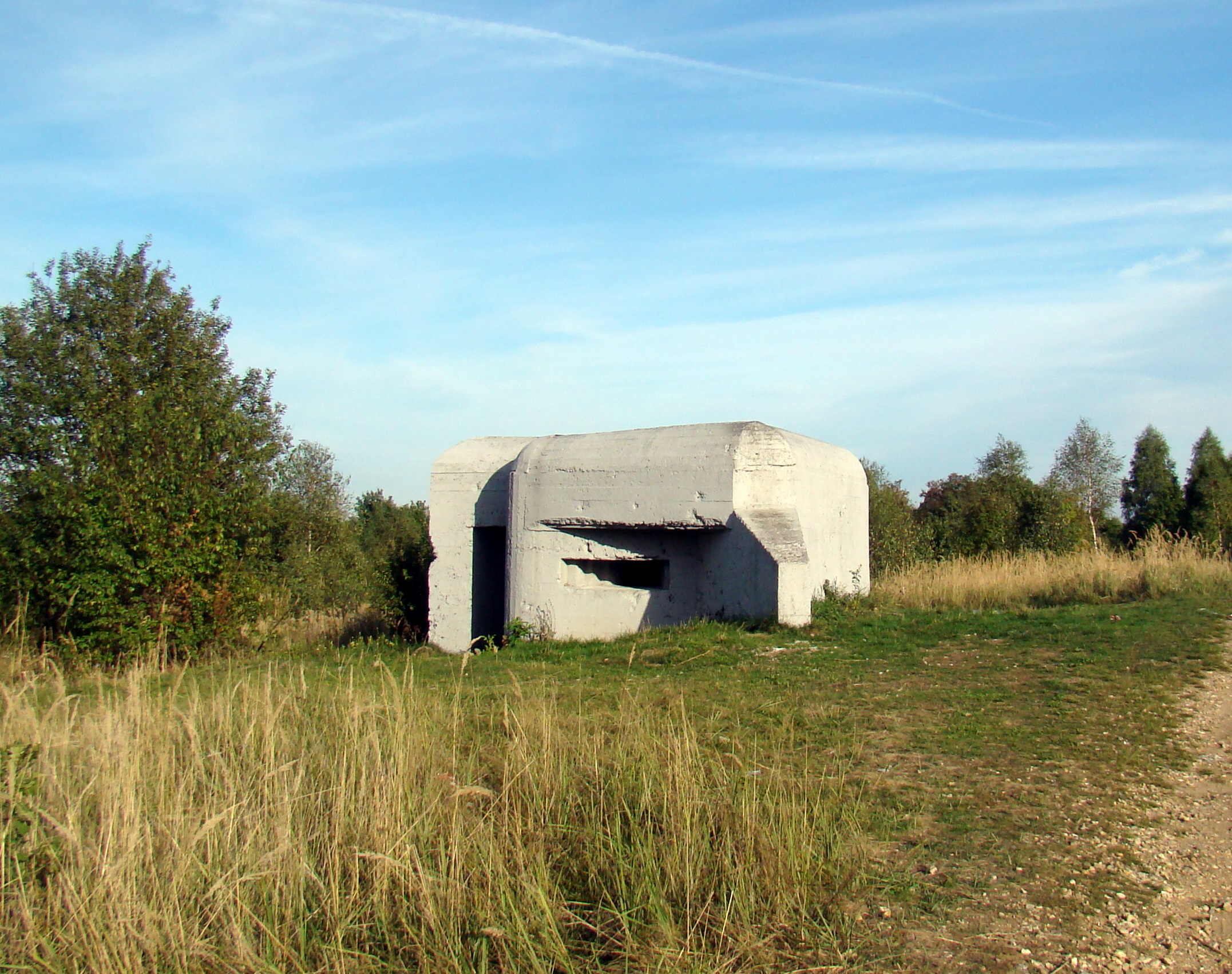 Polski schron bojowy 07 wybudowany w lipcu 1939 roku w ramach częstochowskiej reduty (składającej się z 19 bunkrów, znanych jest 12). Jest to schron do ognia jednobocznego, prawostronny. Obiekt był obsadzony przez żołnierzy 2 kompanii ckm II batalionu 25 pp. Został wybudowany na dawnym placu ćwiczeń 7 pal na wzgórzach Kędory-Sabinów i do końca lat 80. XX w. znajdował się na terenach wojskowych. Stąd też zachowała się część infrastruktury umocnień ziemnych. Trudno jednakże do końca ocenić czyjej są one konstrukcji, gdyż w okolicy przeplatają się polskie umocnienia z niemieckimi z 1944 roku (np. zapory p.panc). Popołudniu 2 września, przyczynił się do odparcia niemieckiego natarcia na Kawodrzę Górną.